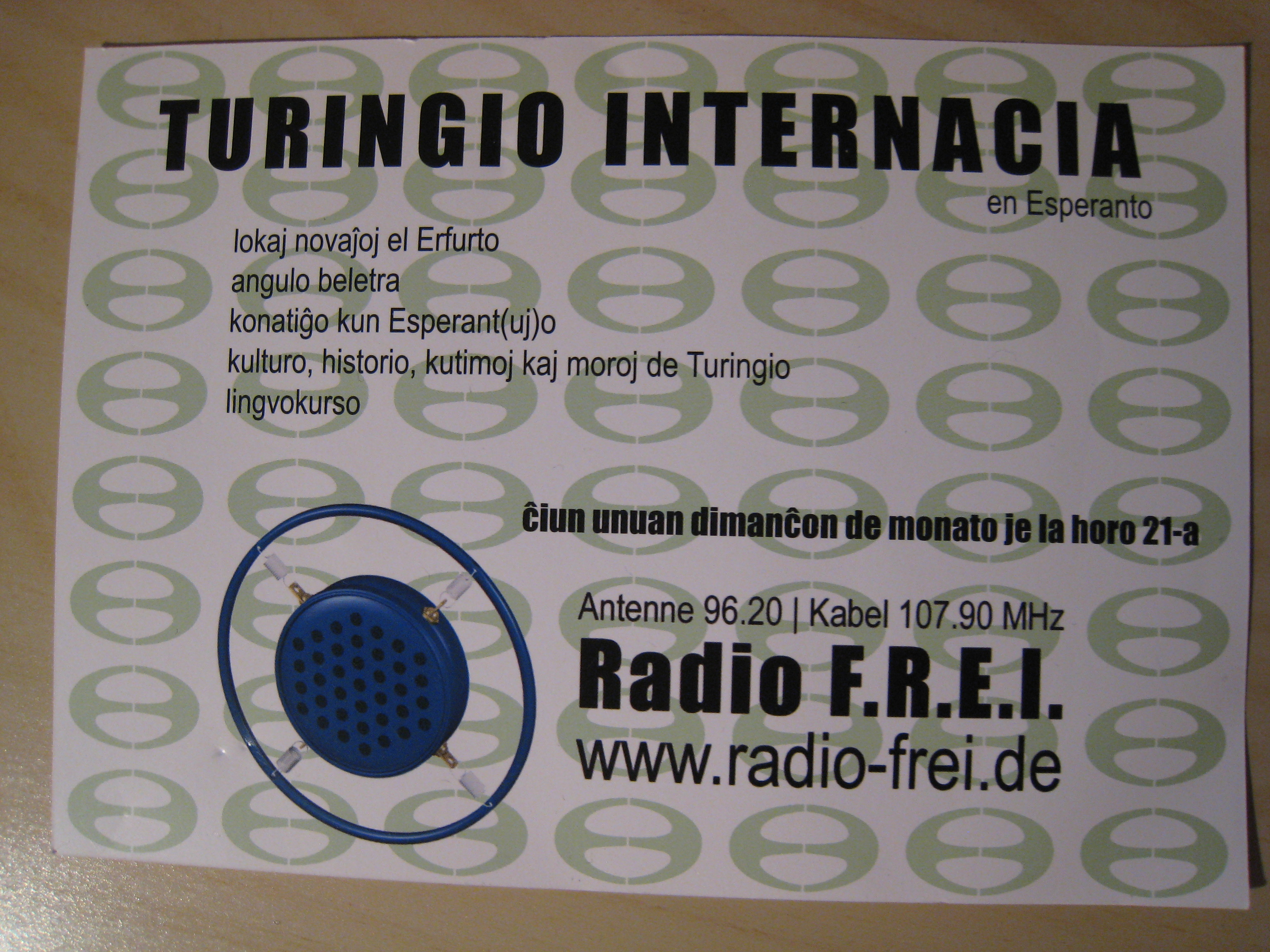 Werbung für die Esperanto-Radiosendung Turingio Internacia von Radio FREI, Erfurt